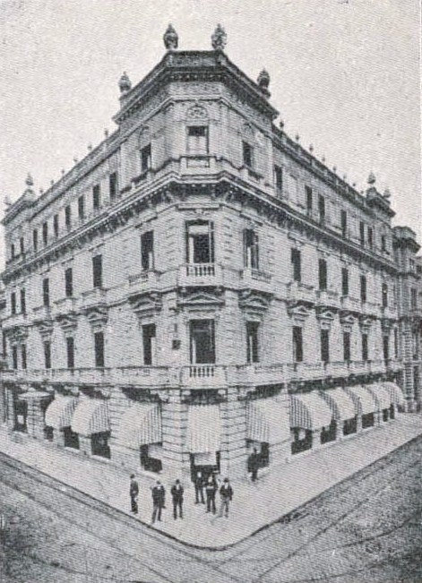 Edificio el Phoenix Hotel, hoy Esplendor Buenos Aires. Arquitectos Agrelo y Le Vacher, 1889.